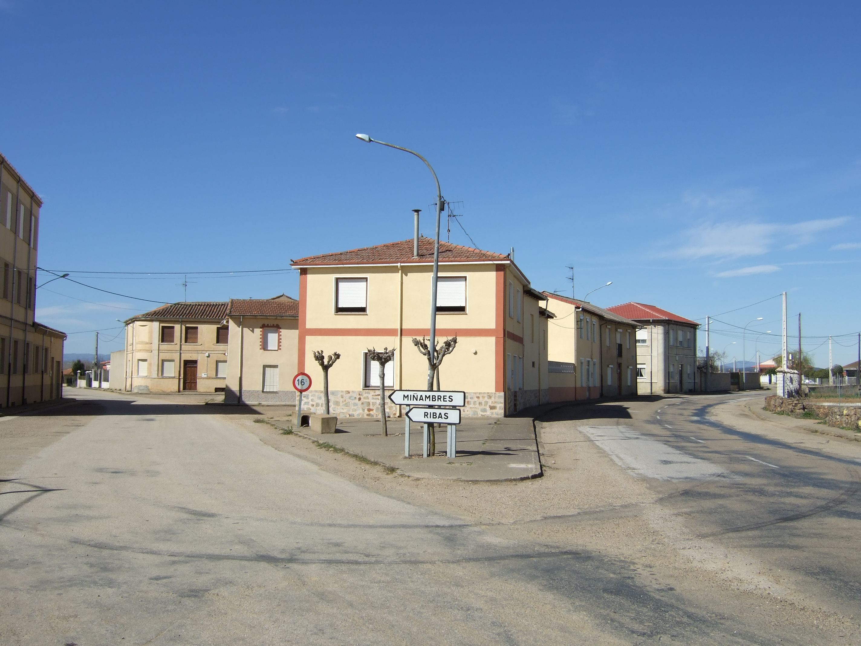 Bifurcación de la carretera de Tabuyo y la de Ribas en Palacios de la Valduerna.